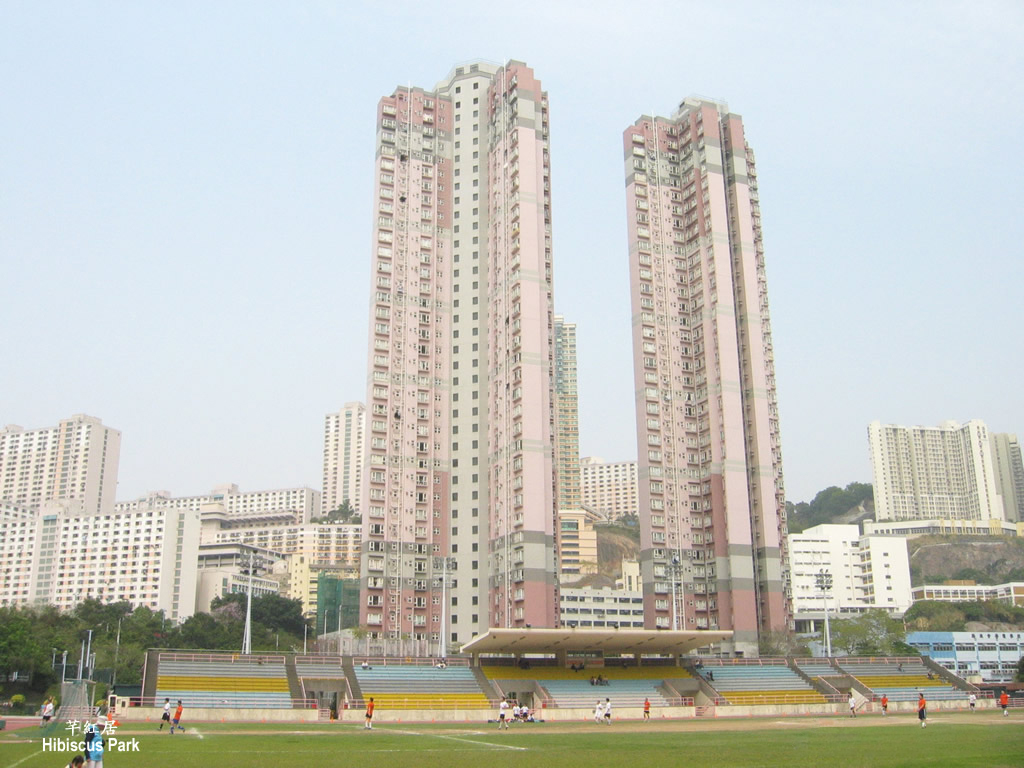 Hibiscus Park, Kwai Chung, New Territories, Hong Kong